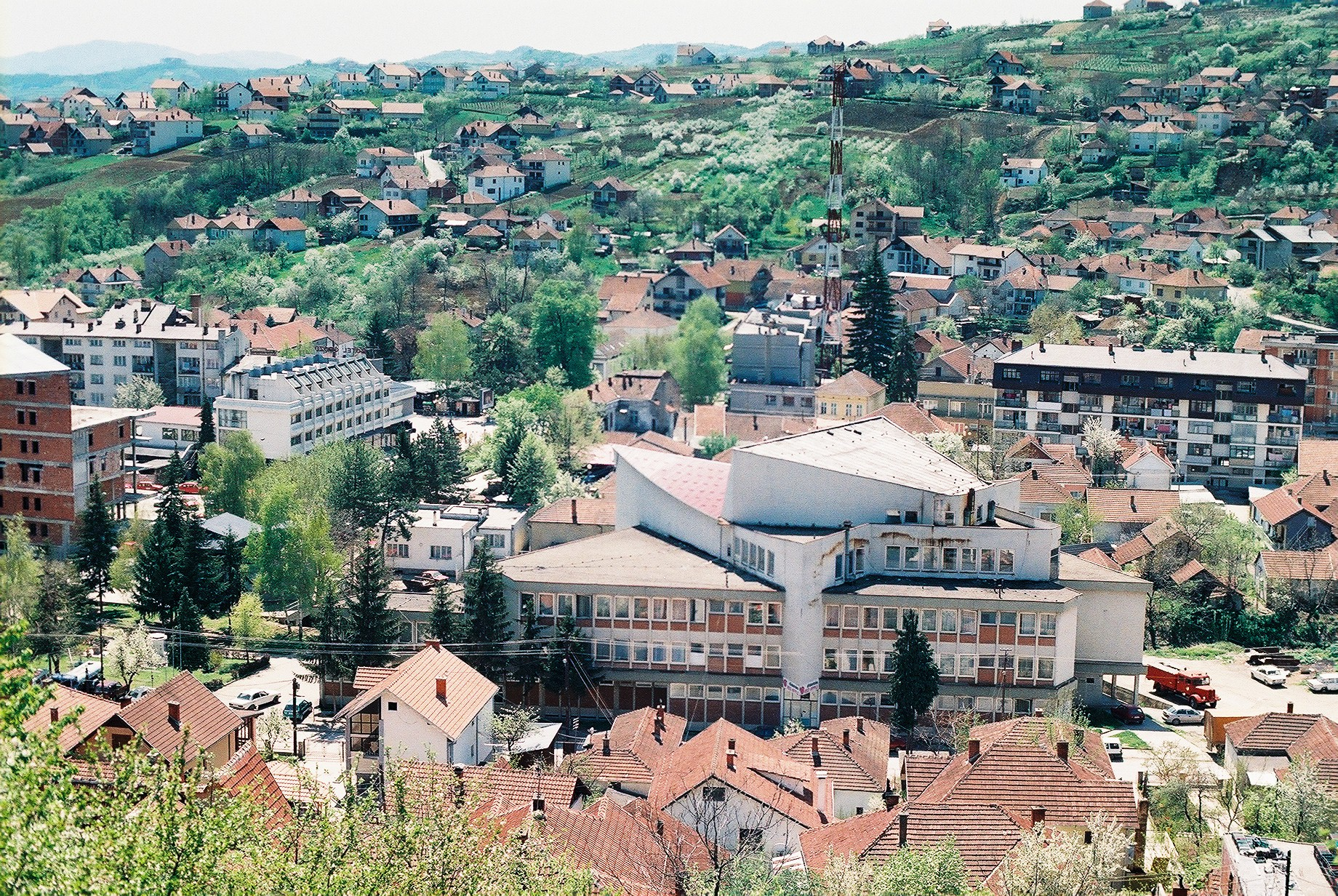 Aleksandrovac